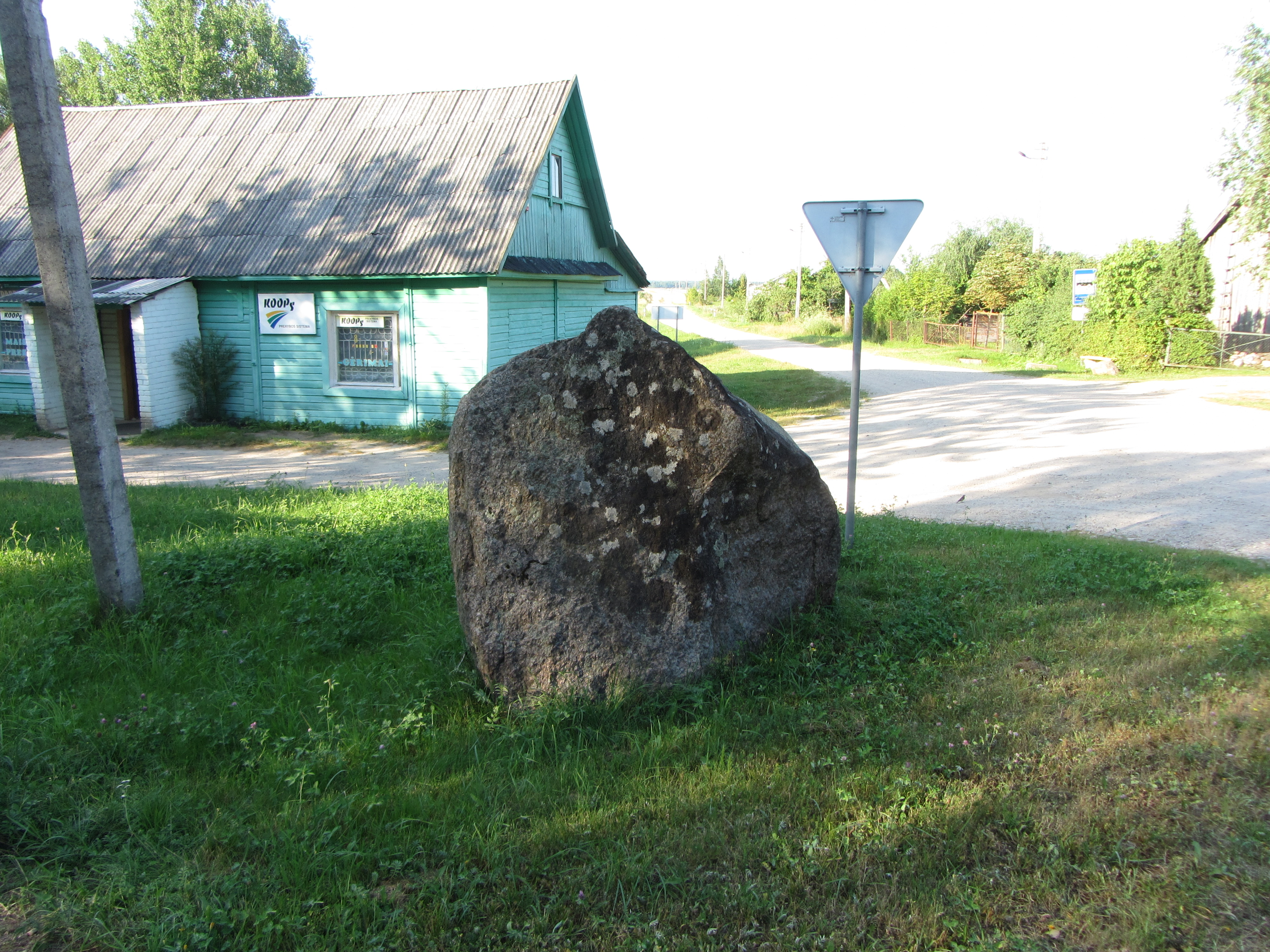 Šiūlėnai, Lithuania